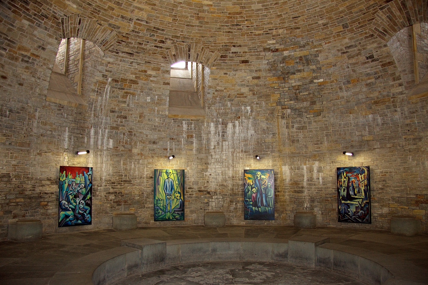 Deutschland einzige Dreiecksburg, Datum/Uhrzeit: 22.08.2010 12:11:59